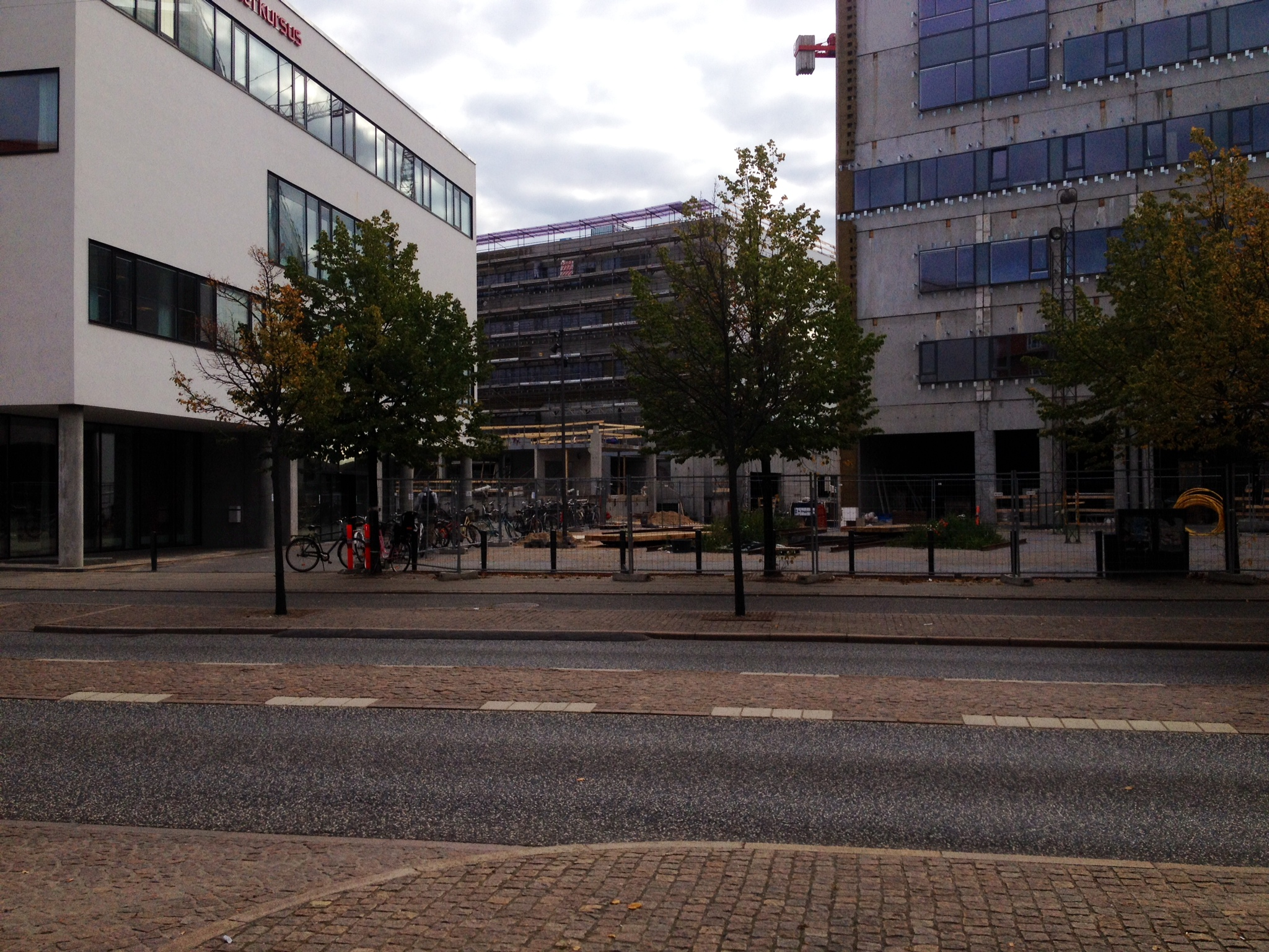 Godsbanen fra den vestlige del af Jyllandsgade